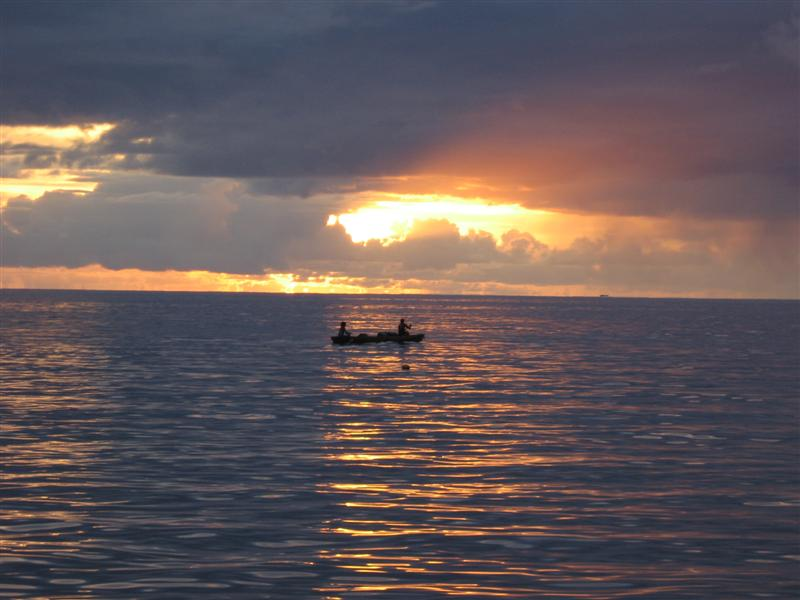 Mooie zonsondergang op Biak